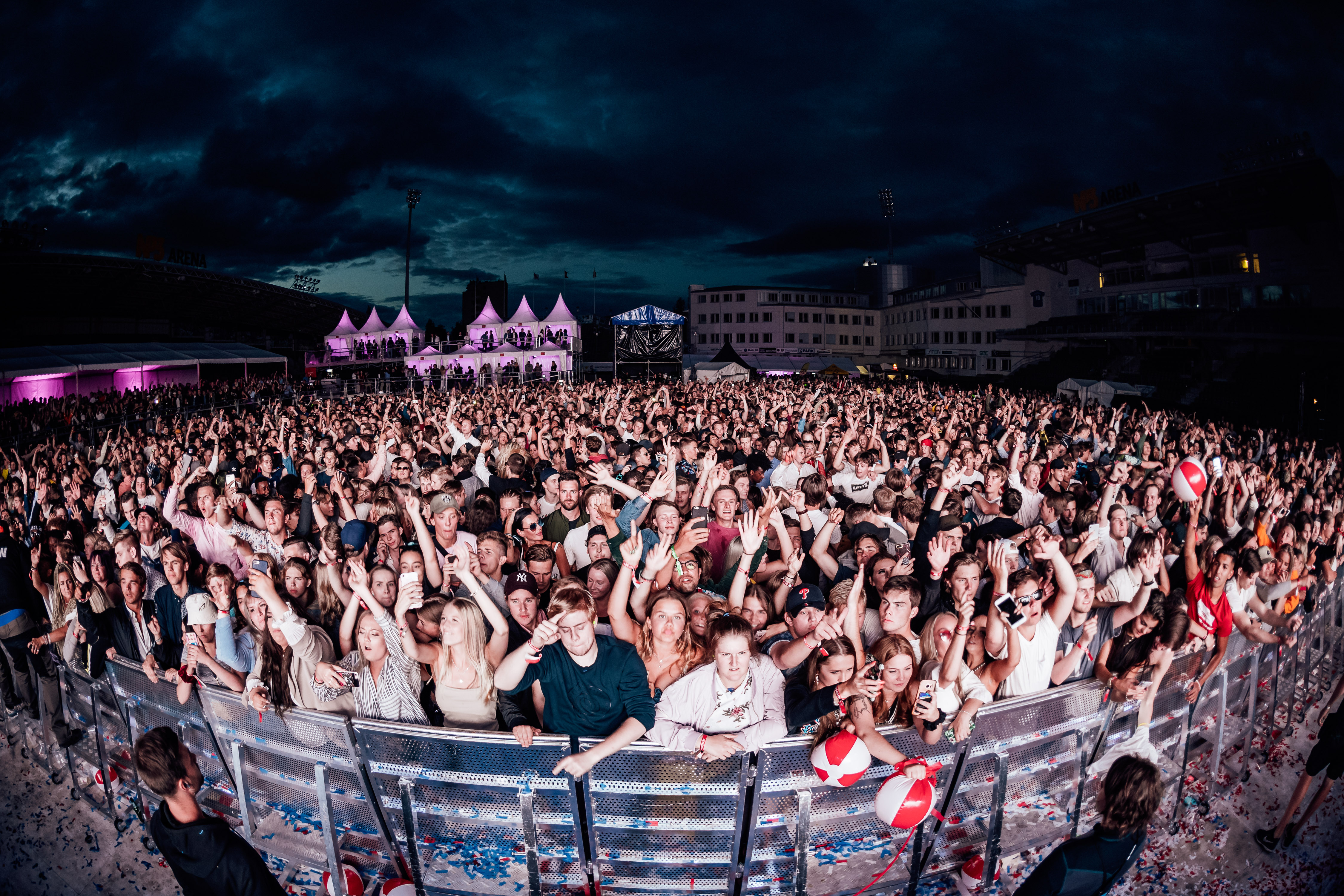 Uppträdade på Sensommar! festival i sundsvall